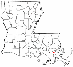 Volapük: Topam in tat: Louisiana.